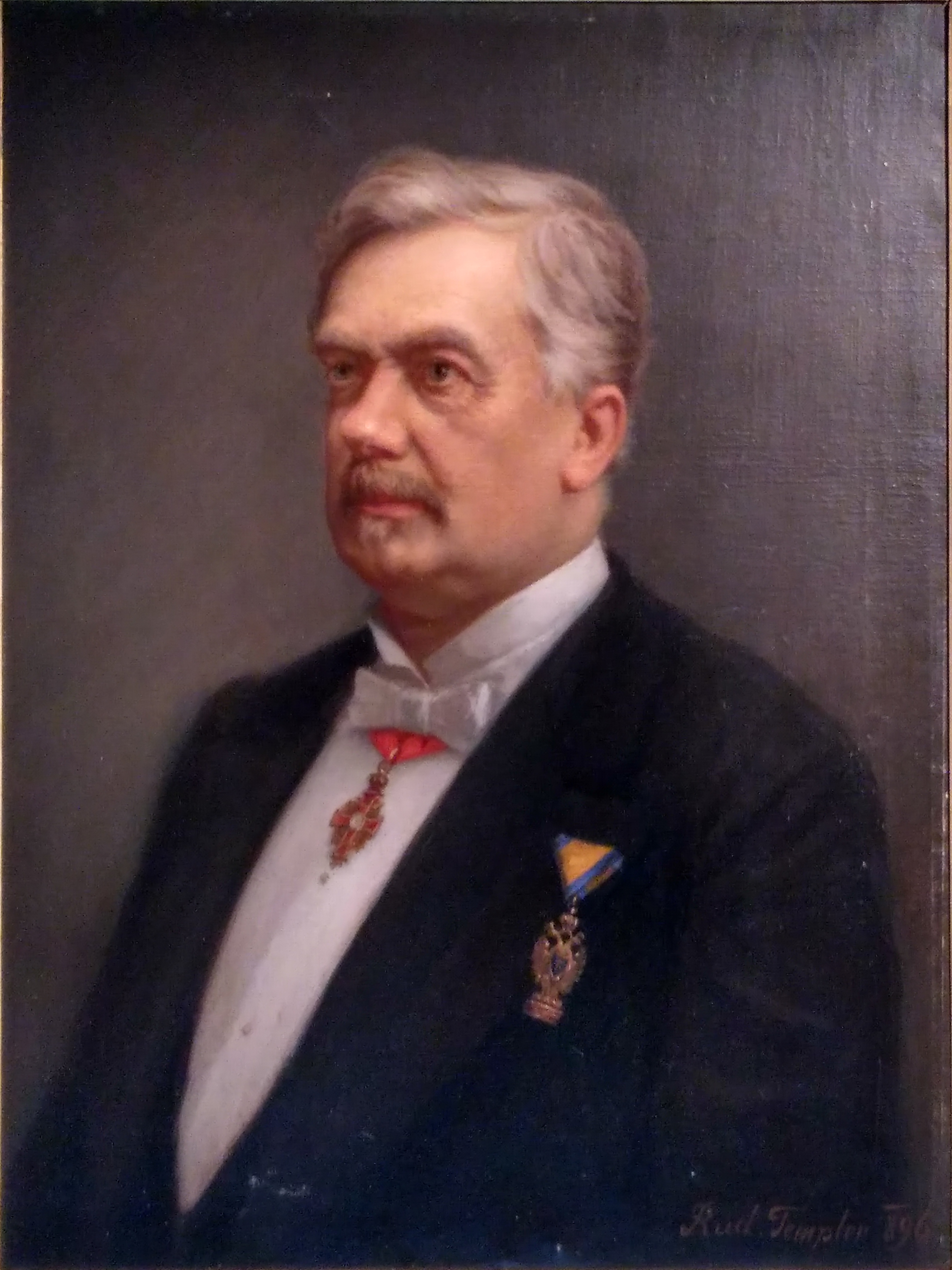 Rudolf Templer, poslanec Zemského sněmu Emil Grohmann, starosta Vrbna pod Pradědem, 1896, olej na plátně